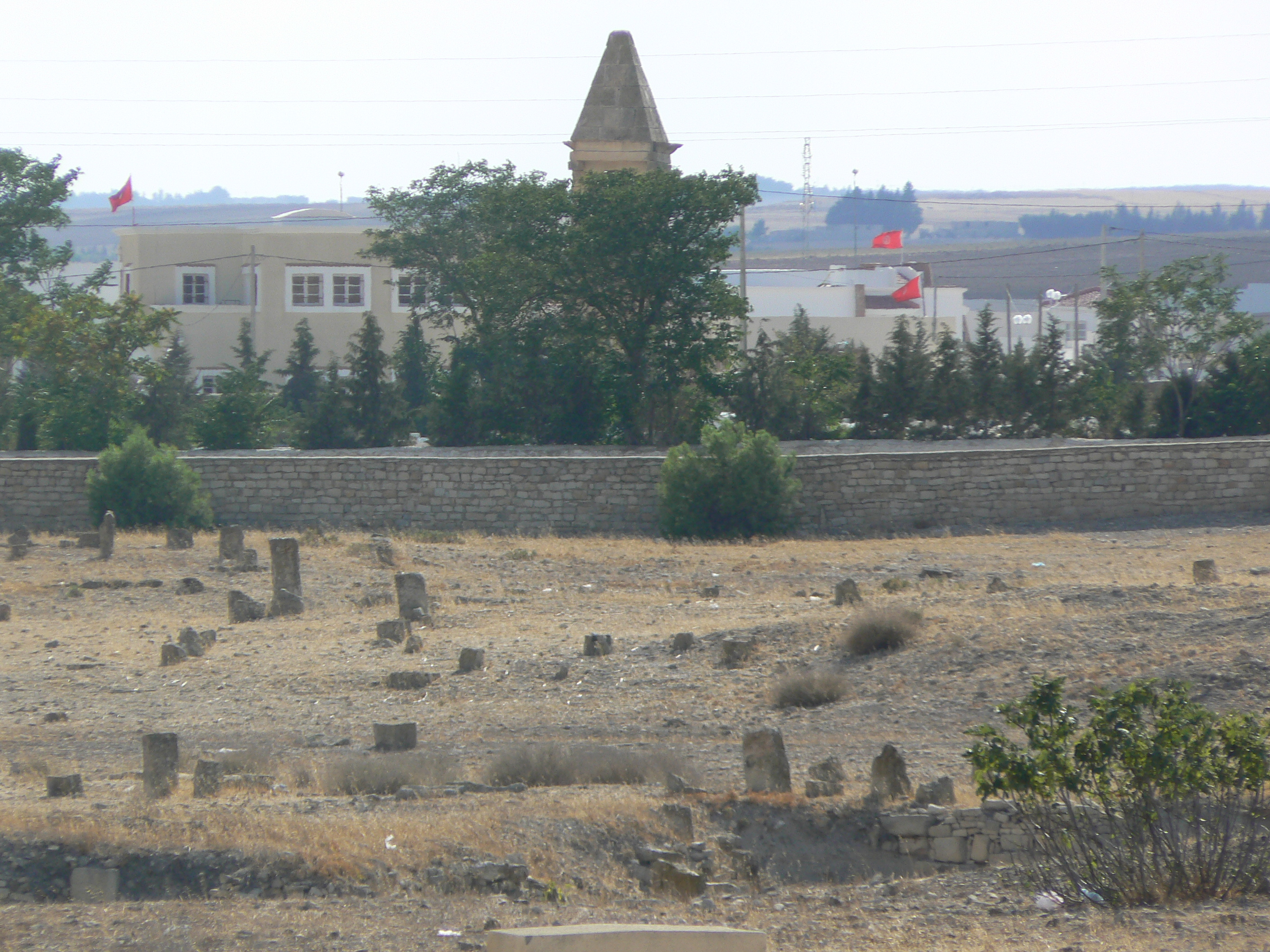 Mausolée pyramidal de Makthar vu du parc archéologique